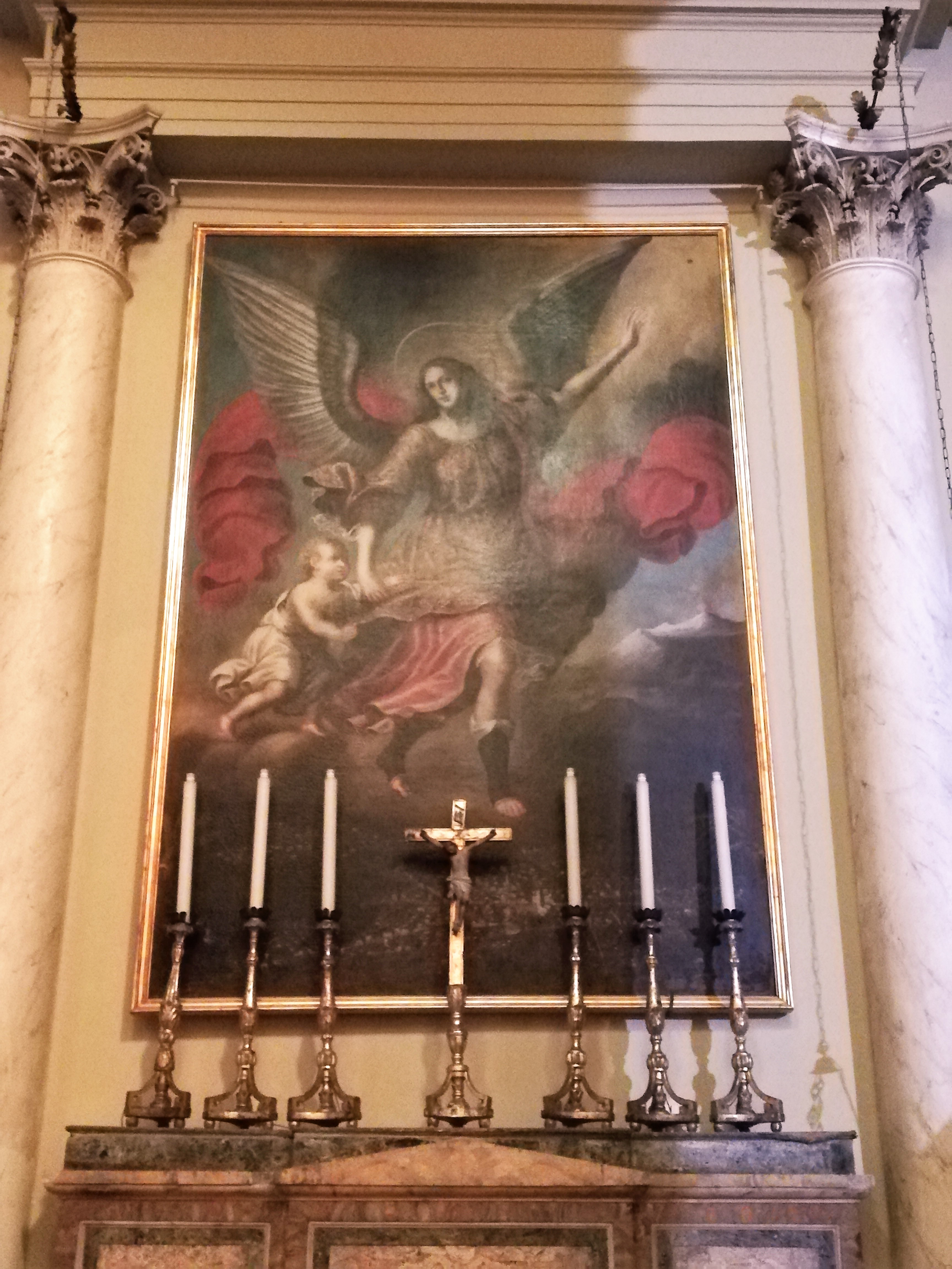 Angelo Custode, opera del 1630 di Antonio e Giacinto Platania, custodito nella cappella eponima.